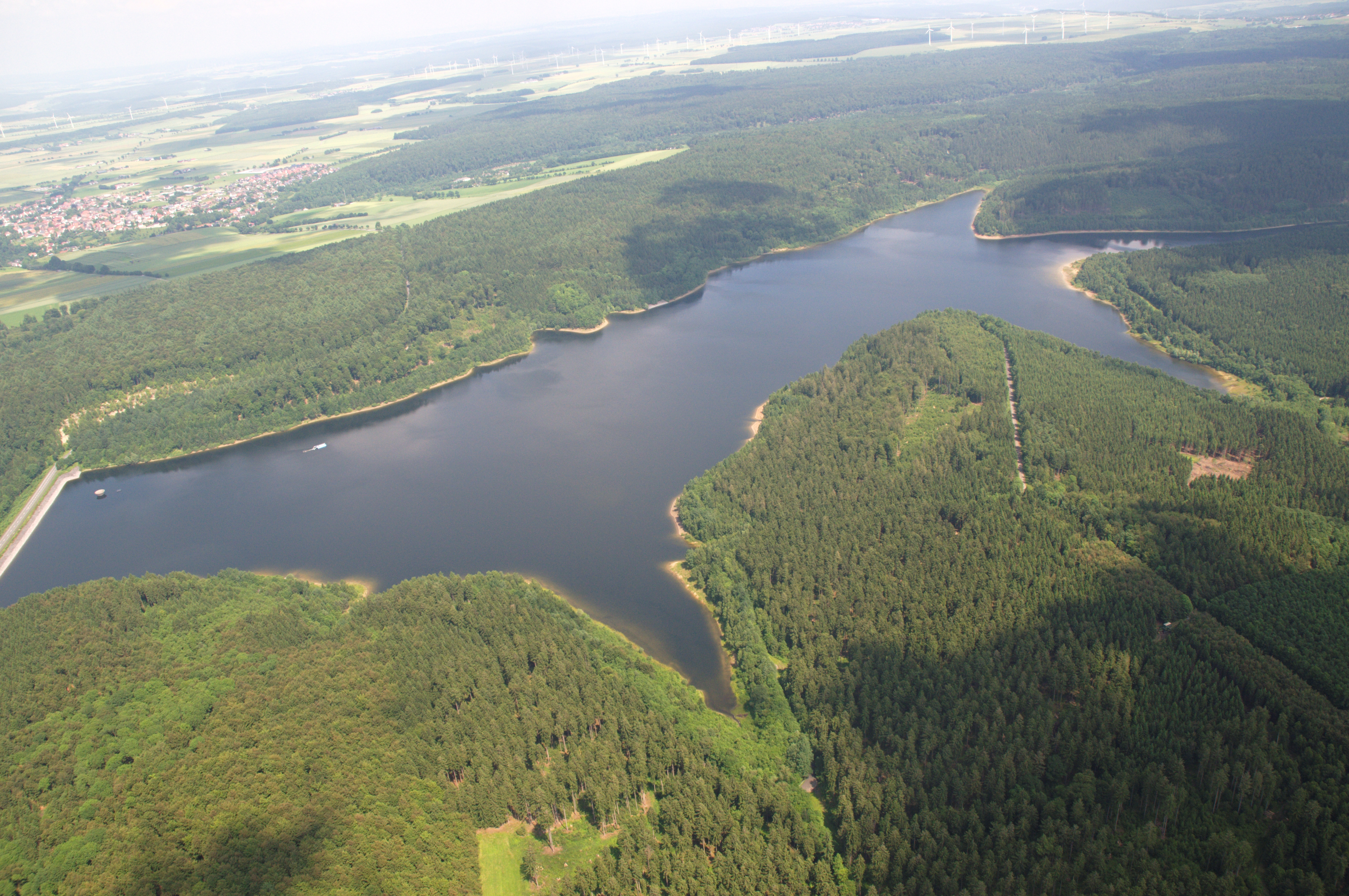 Luftaufnahme Aabachsee, Bad Wünnenberg, Kreis Paderborn (im Rahmen des Fotoflugs Sauerland-Ost) The making of this document was supported by the Community-Budget of Wikimedia Germany.